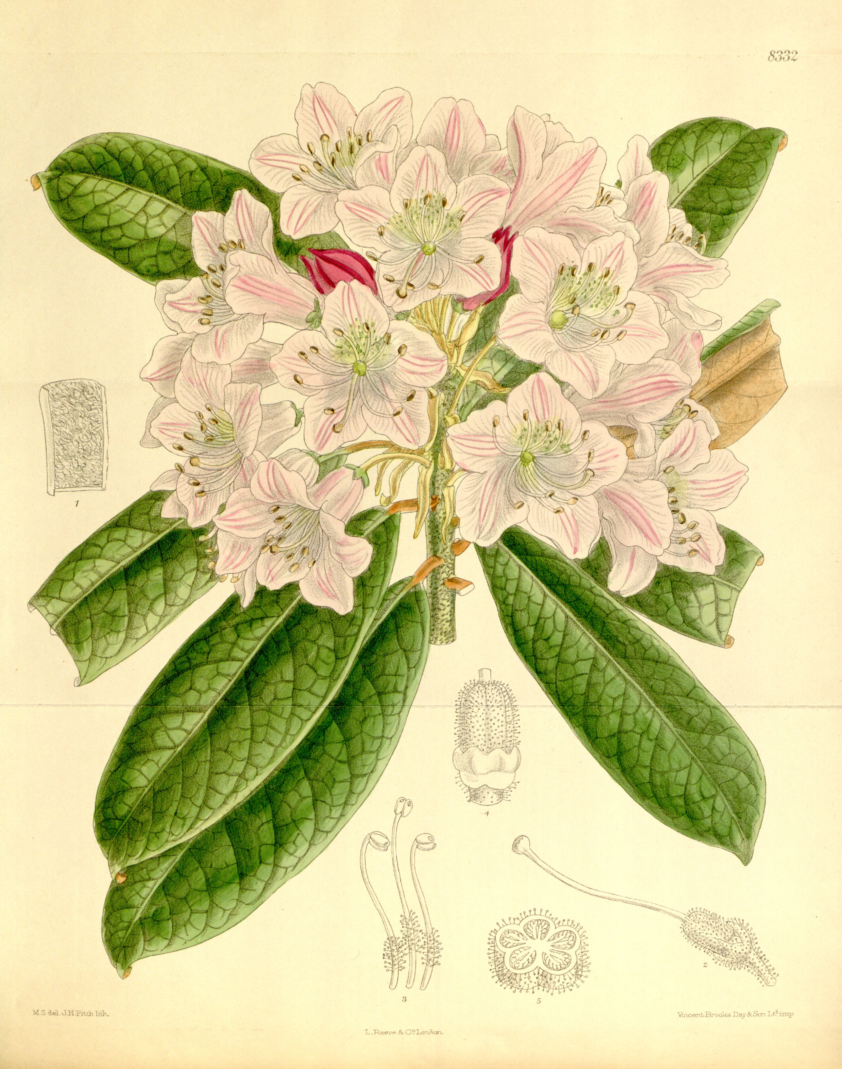 Rhododendron ungernii, Ericaceae